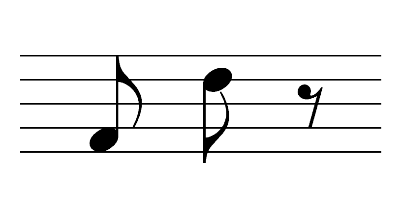 Description : Croches et demi-soupir Source : Personnelle Licence : GFDL